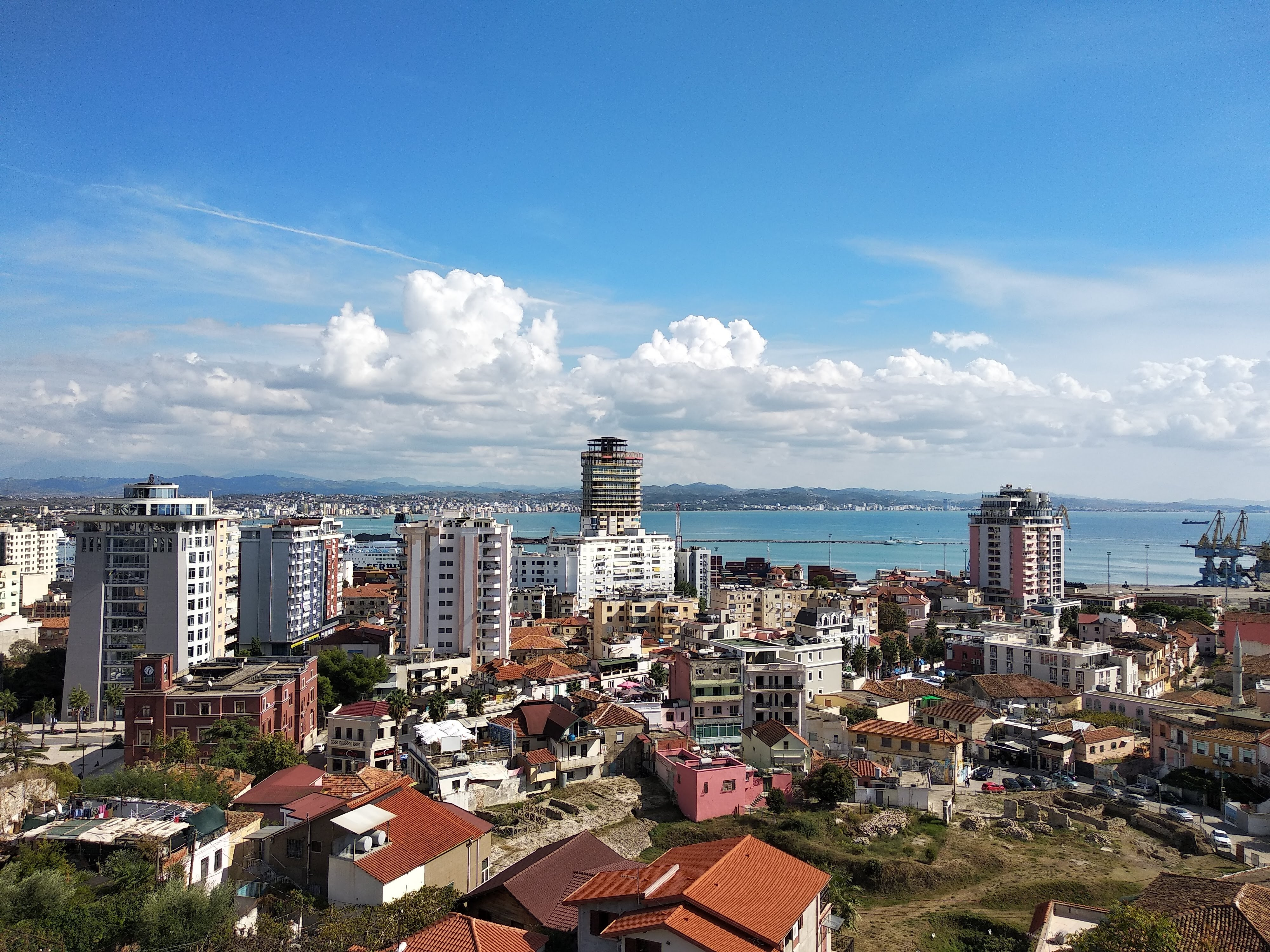 Pamje e qytetit të Durrësit nga Torra e Kalasë së Durrësit.